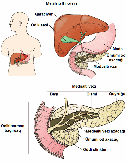 Mədəaltı vəzin qurluşu:baş hissə, cismi, quyruq hissə